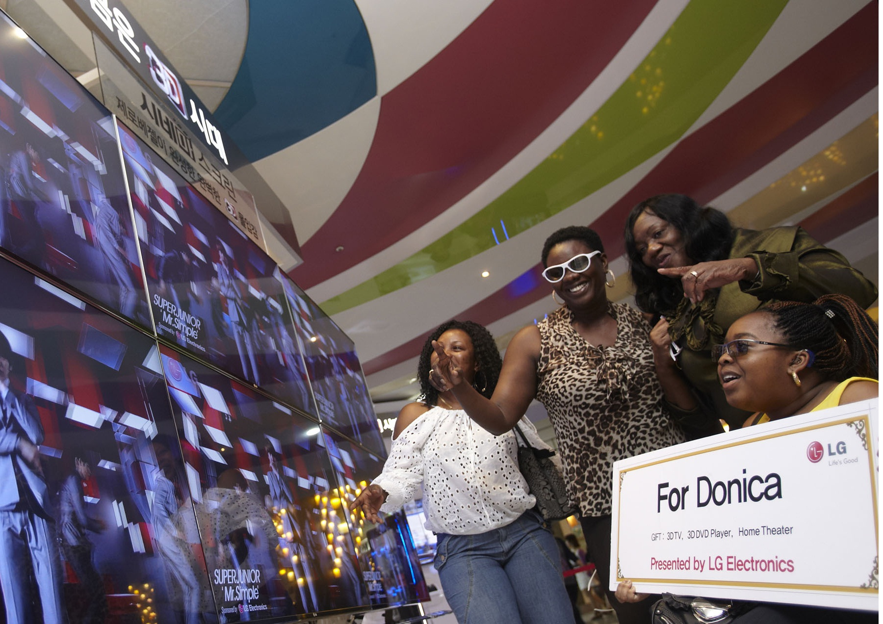 K팝을 사랑하는 미국의 시한부 소녀 도니카 스털링이 1일 서울 강남구 삼성동 소재의 ‘LG 시네마 3D 체험존’을 방문했다.